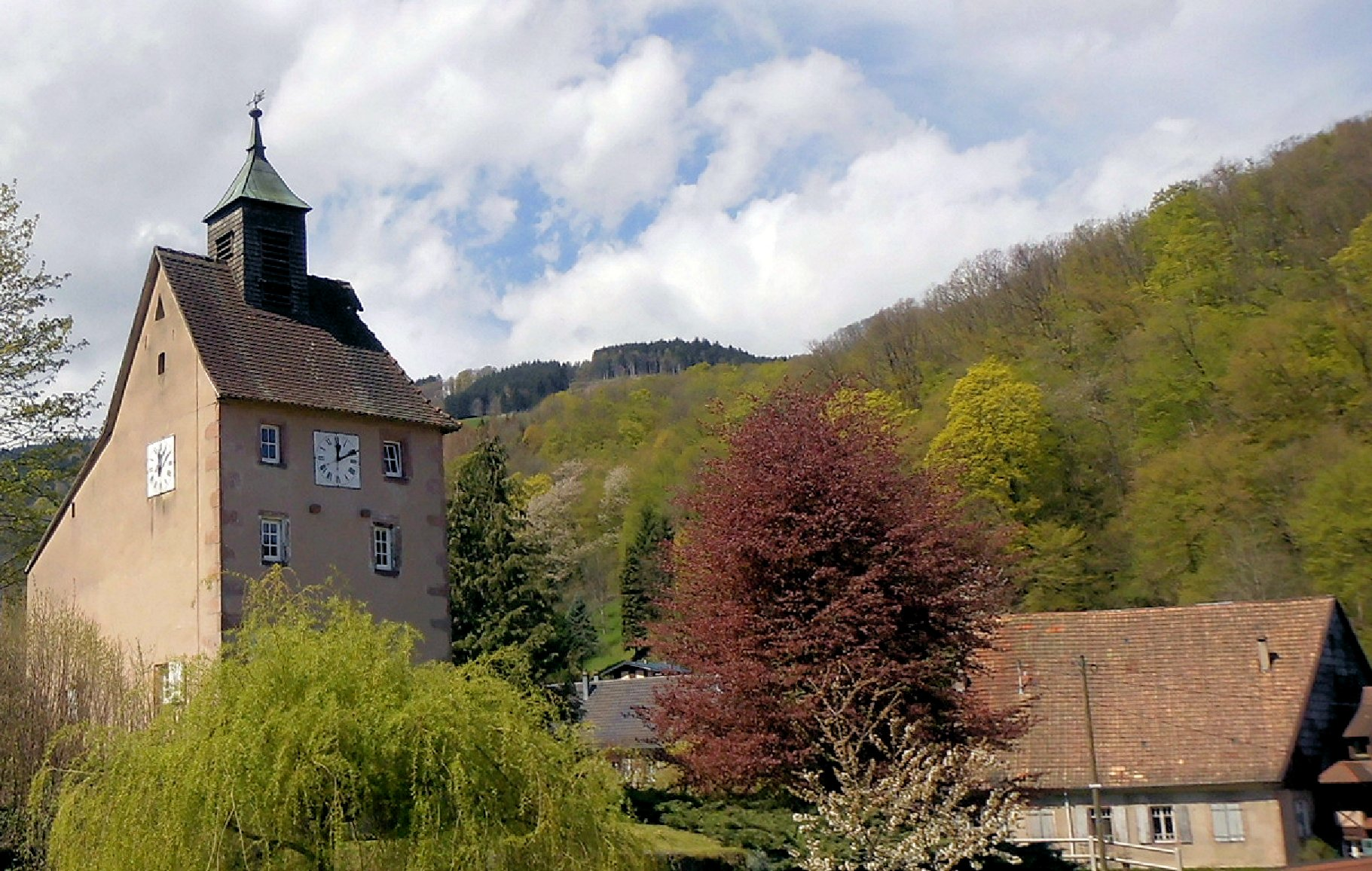 La Tour des mineurs, dite aussi Tour de l'Horloge ou Prison des mineurs à Échery, commune de Sainte-Marie-aux-Mines